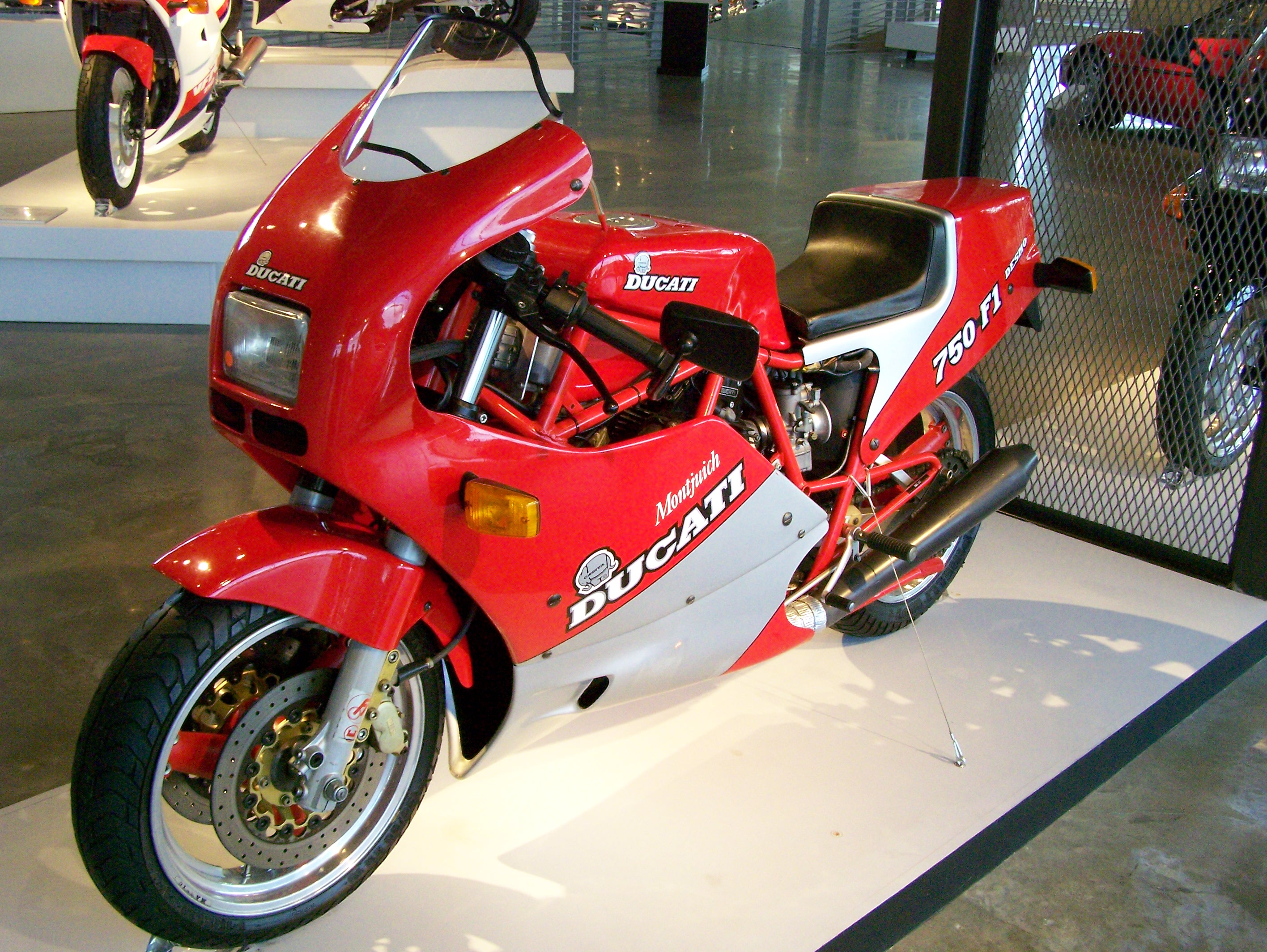 Barber Vintage Museum_437 - Ducati 750 F1